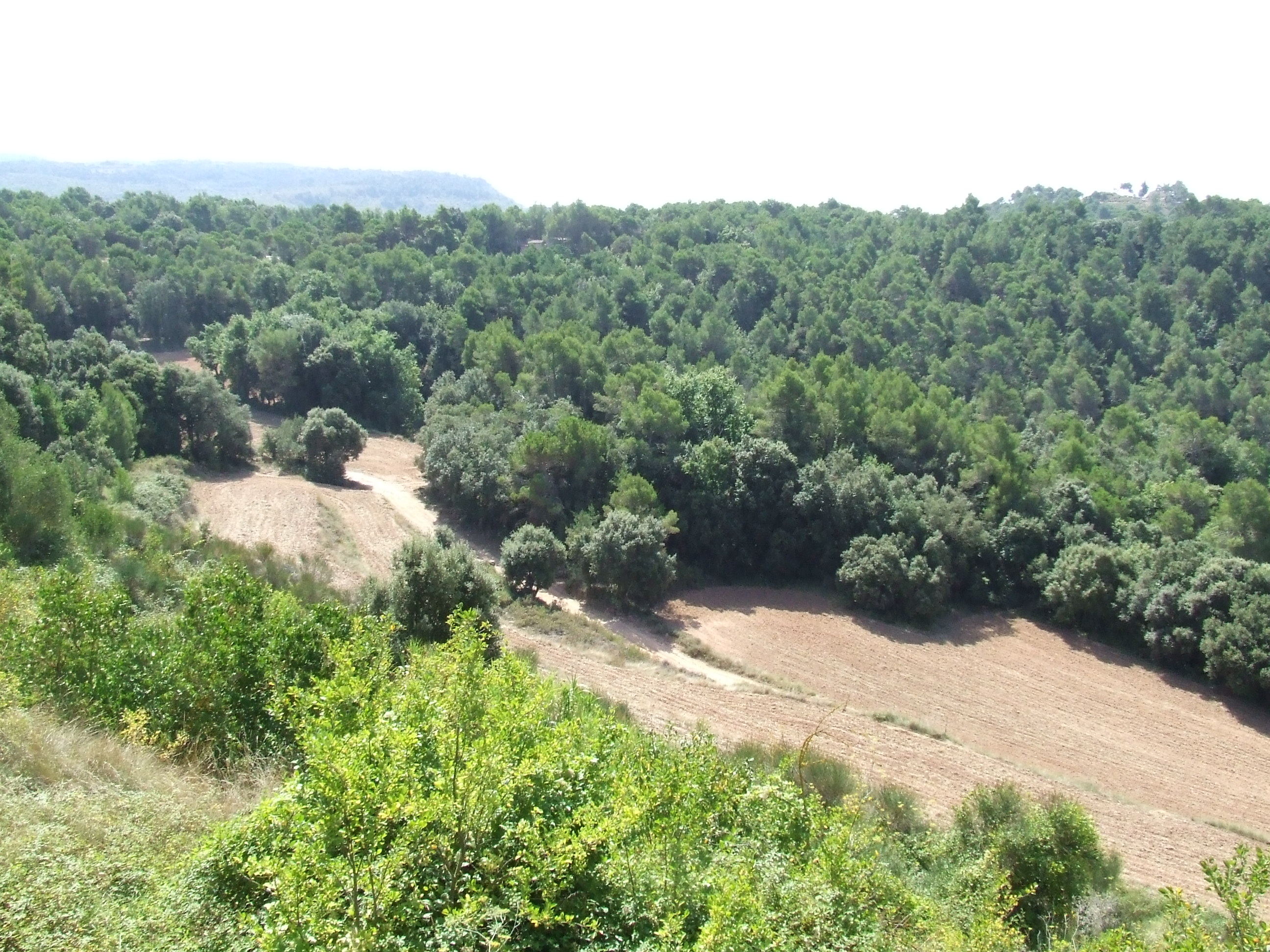 El torrent de la Rectoria (Granera, Moianès)